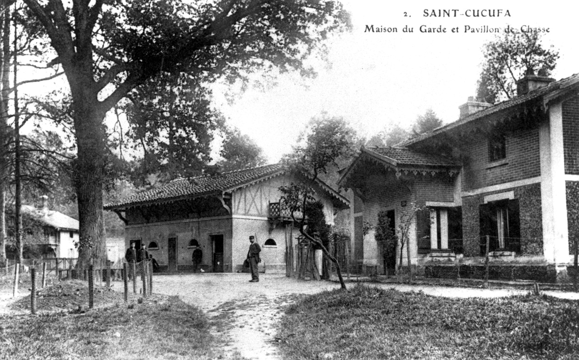 Cabanes près de l'étang de Saint Cucufa